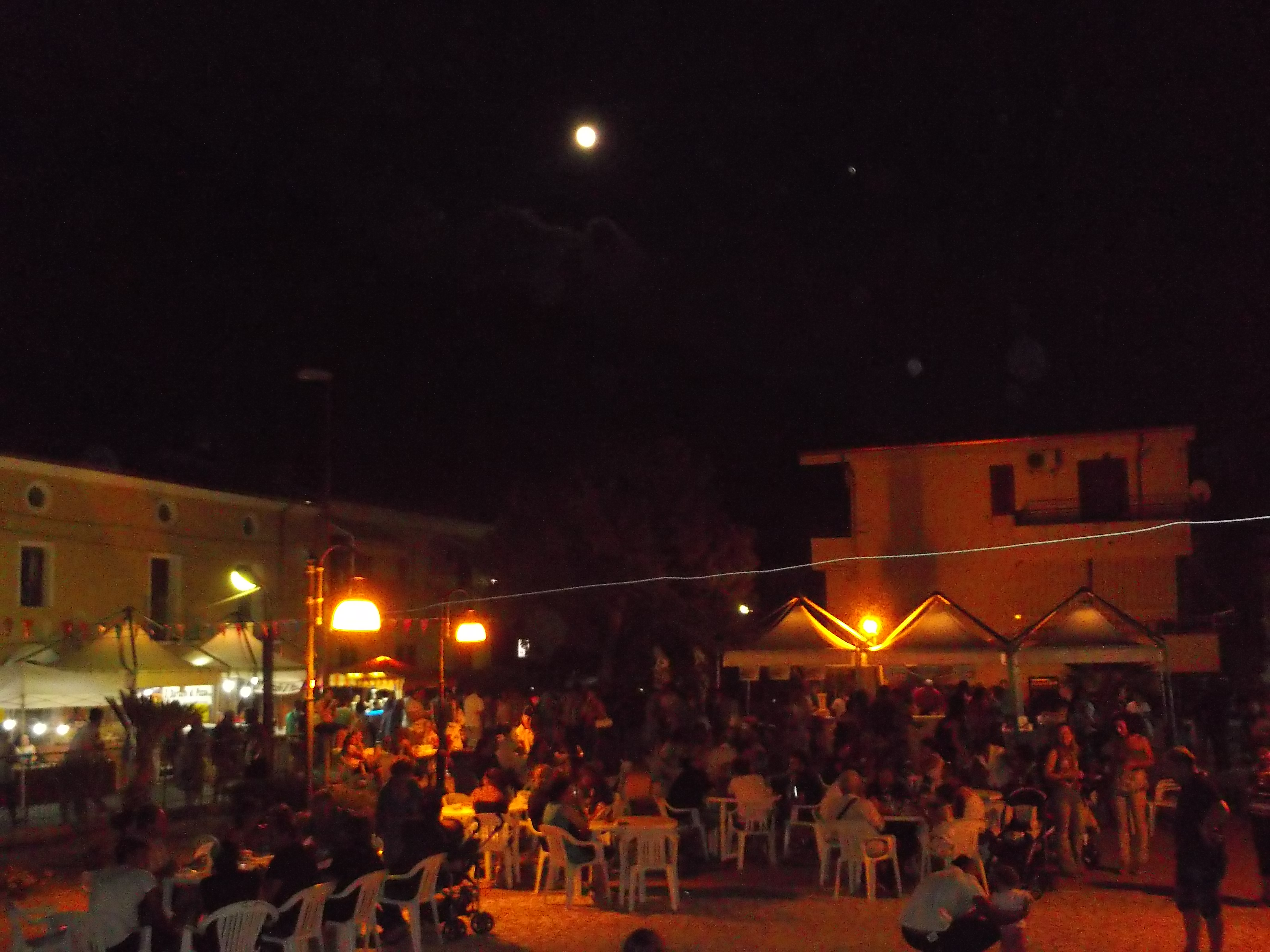 una veduta notturna di Coreca dalla Piazza Principale del Borgo